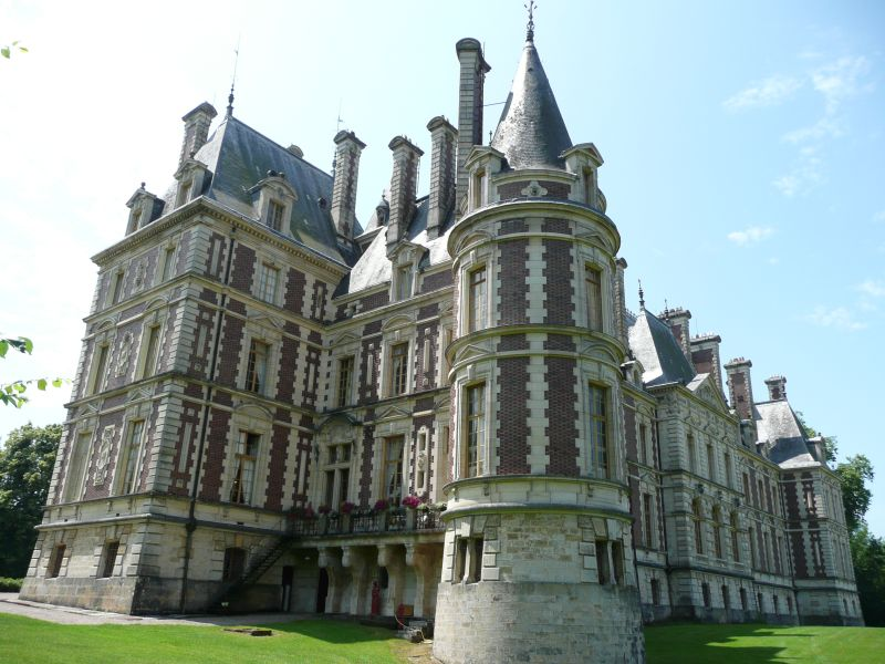 Photo du château de villersexel depuis le Nord Est, vue sur la chapelle